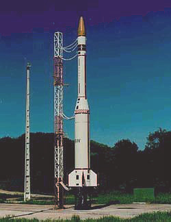 Foguete Sonda IV aguardando o lançamento.